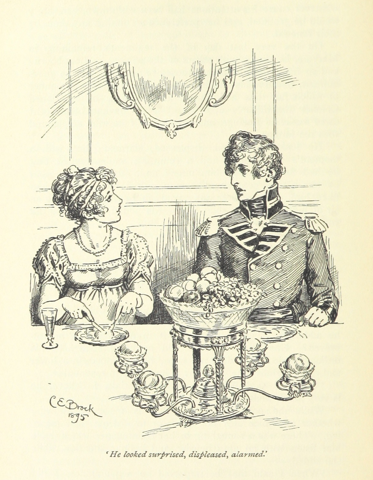 Illustration de C. E. Brock pour Pride and Prejudice (Edition MacMillan & C°, ch. 41) les remarques d'Elizabeth inquiètent Wickham